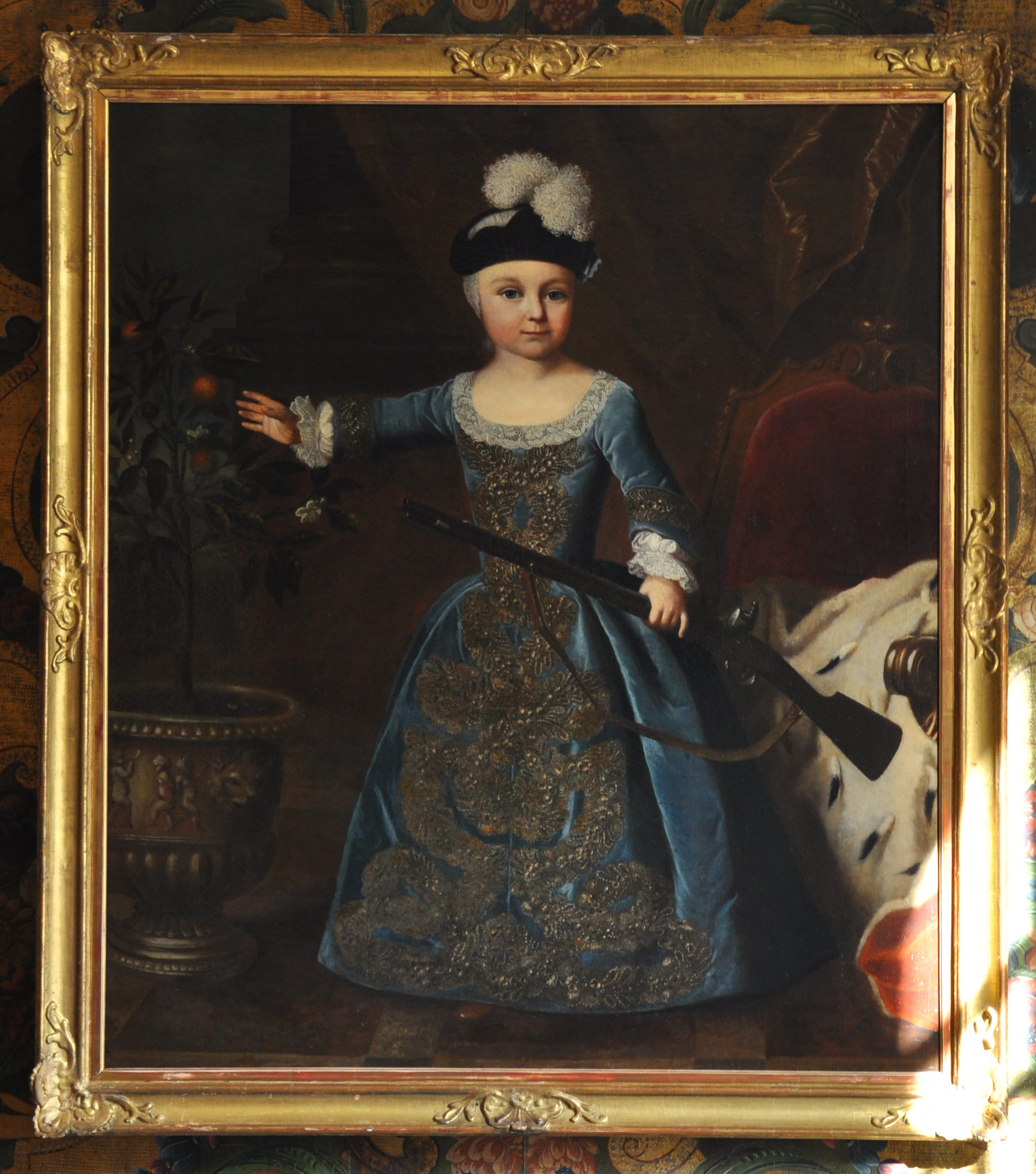 Prinz Georg Karl von Hessen-Darmstadt (1754–1830), Sohn des Prinzen Georg Wilhelm, mit Gewehr und Hermelinmantel